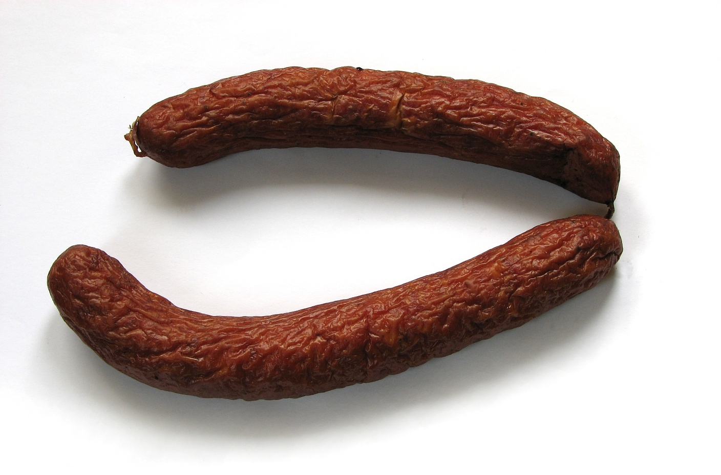 Polish sausage, kiełbasa, krajańska